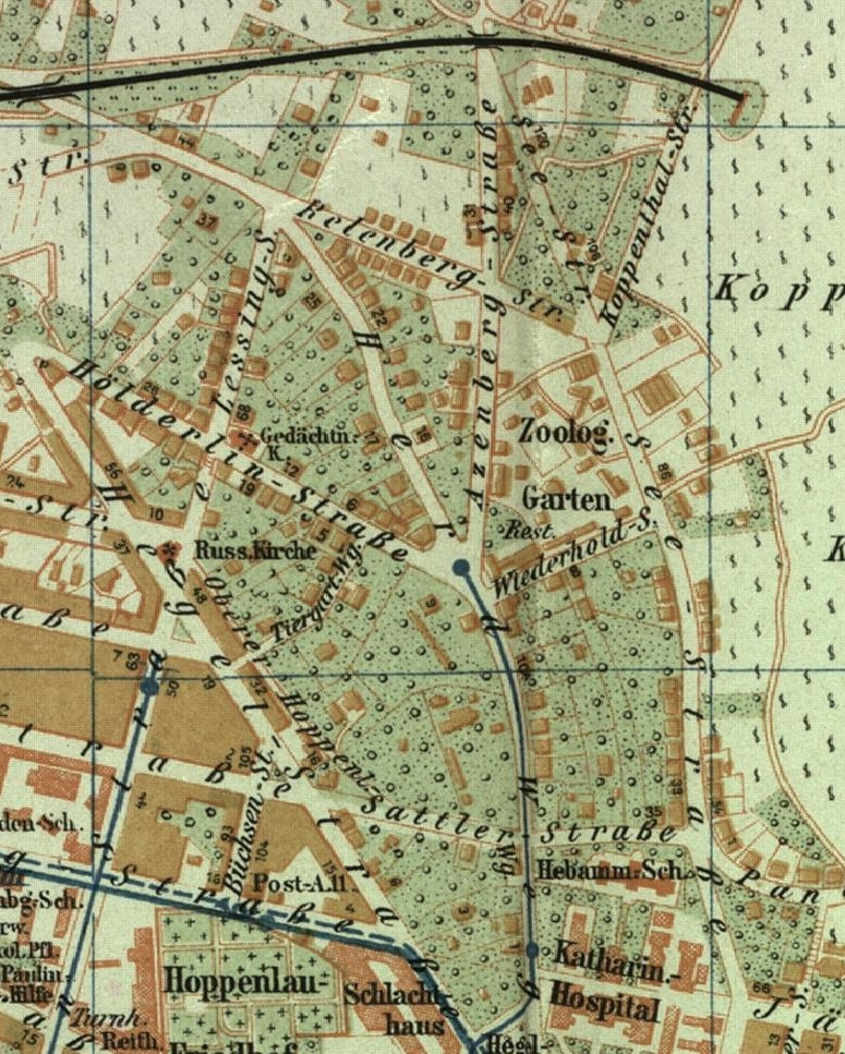 Stadtplan von Stuttgart, Ausschnitt mit Nills Tiergarten, 1905.